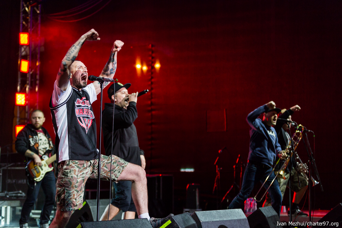 Koncert "Solidarni z Białorusią" 12 kwietnia 2014 roku na ul. gen. Tokarzewskiego-Karaszewicza w Warszawie.